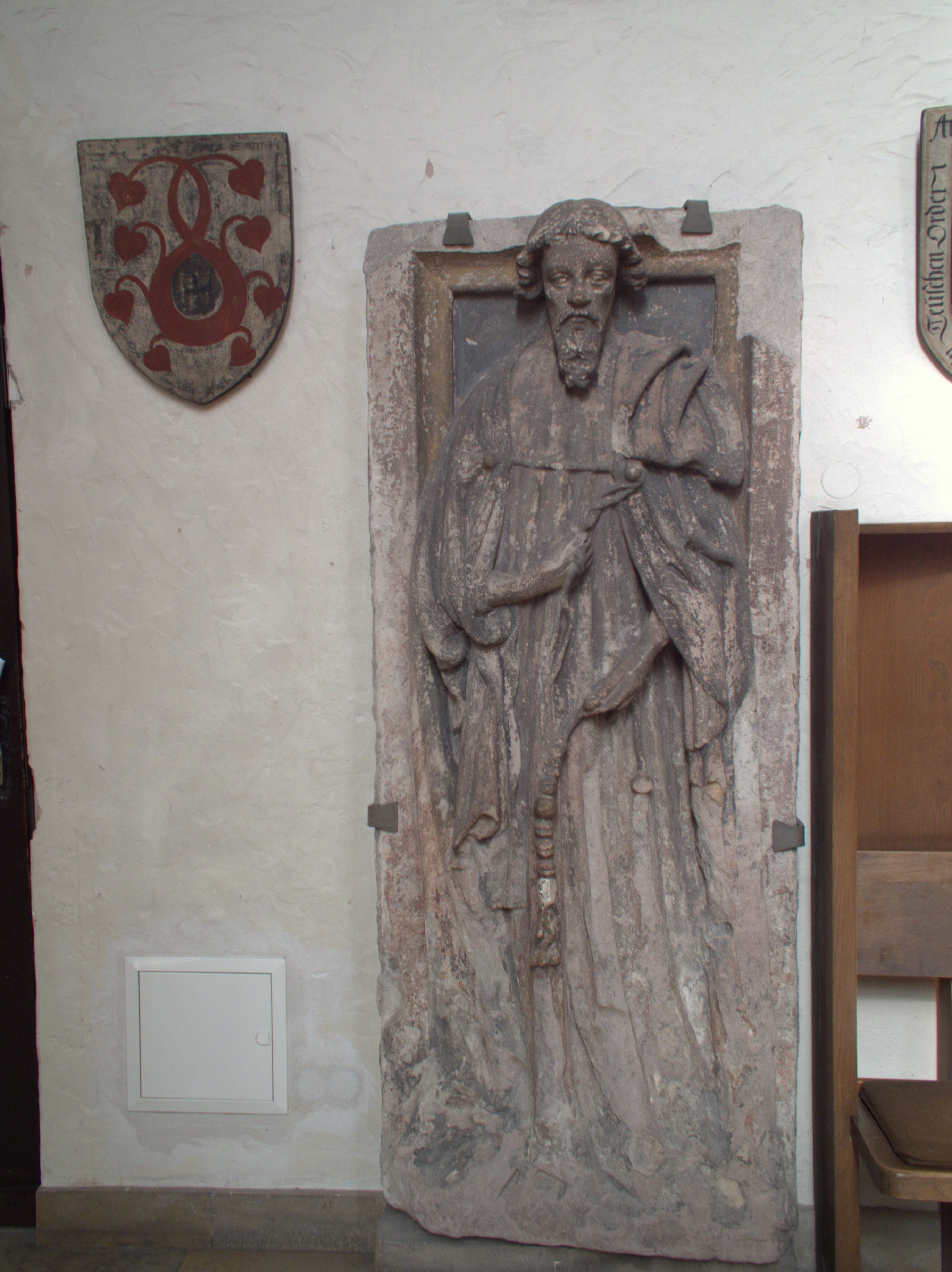 Die evangelische Pfarrkirche St. Jakob in Nürnberg